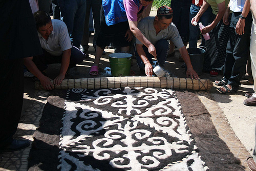 Alaca Keçe yapımı